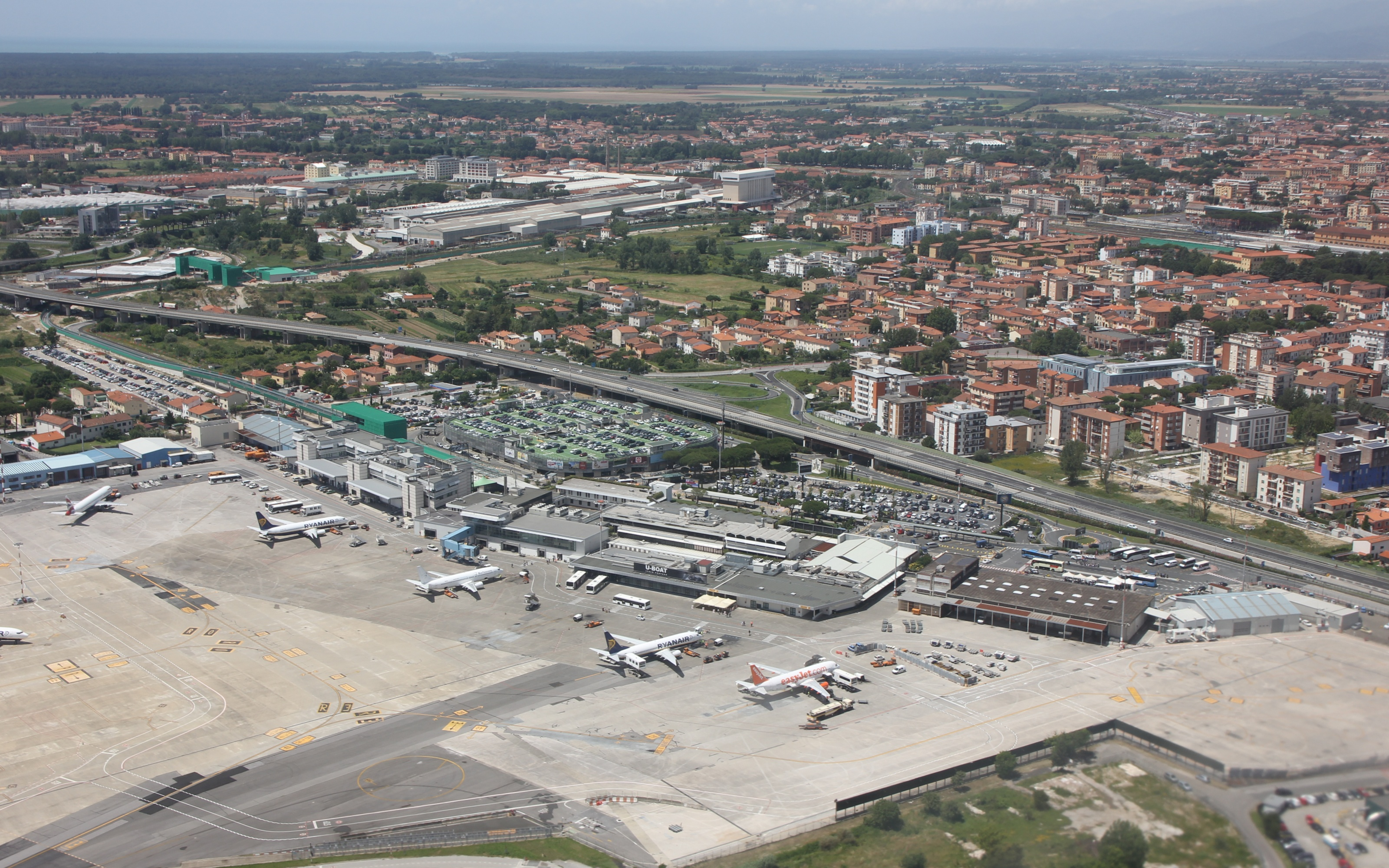 Luftaufnahme Flughafen Pisa